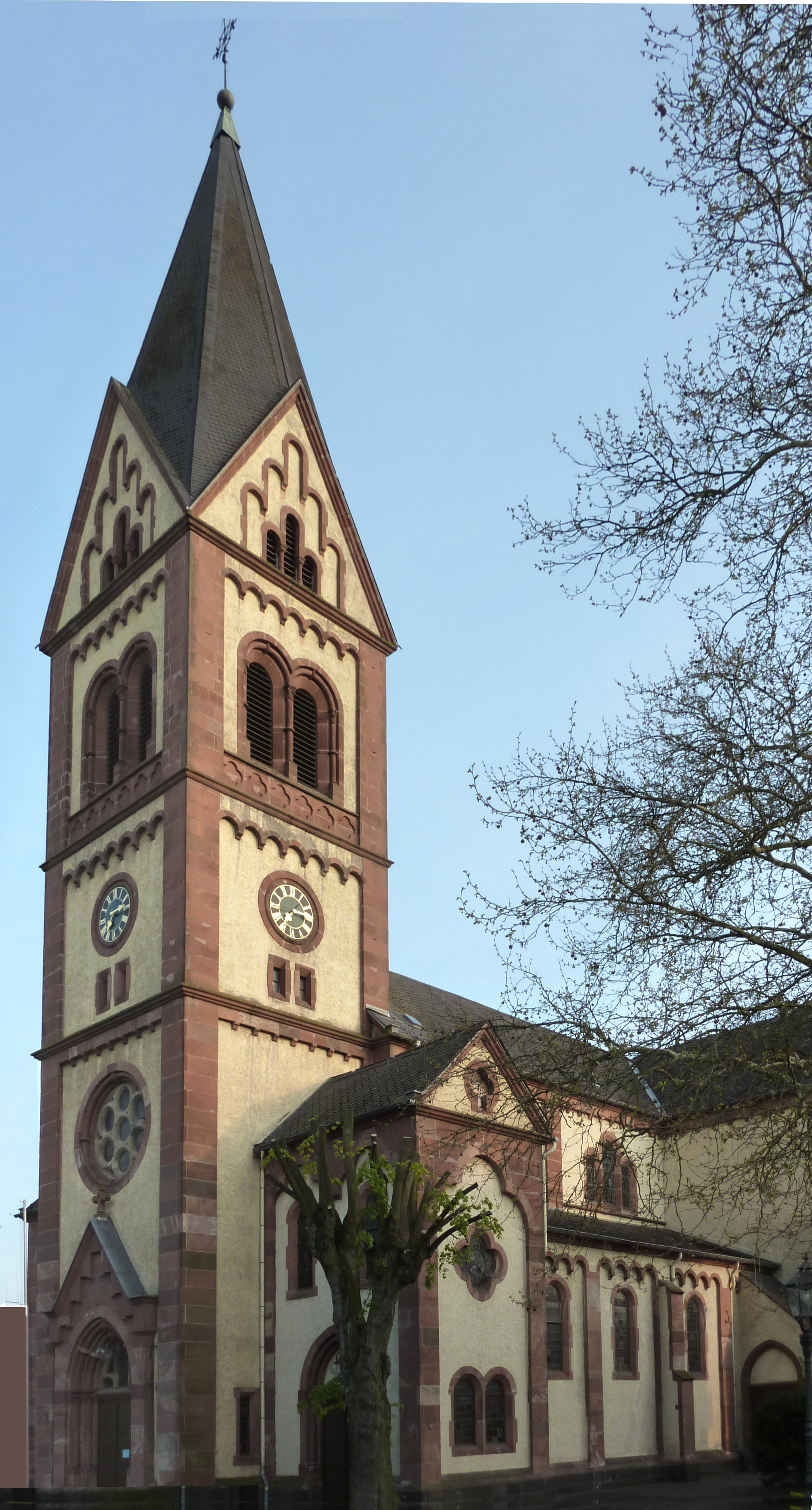 Kirche St. Martin in Bassenheim, Turm und Kirchenschiff